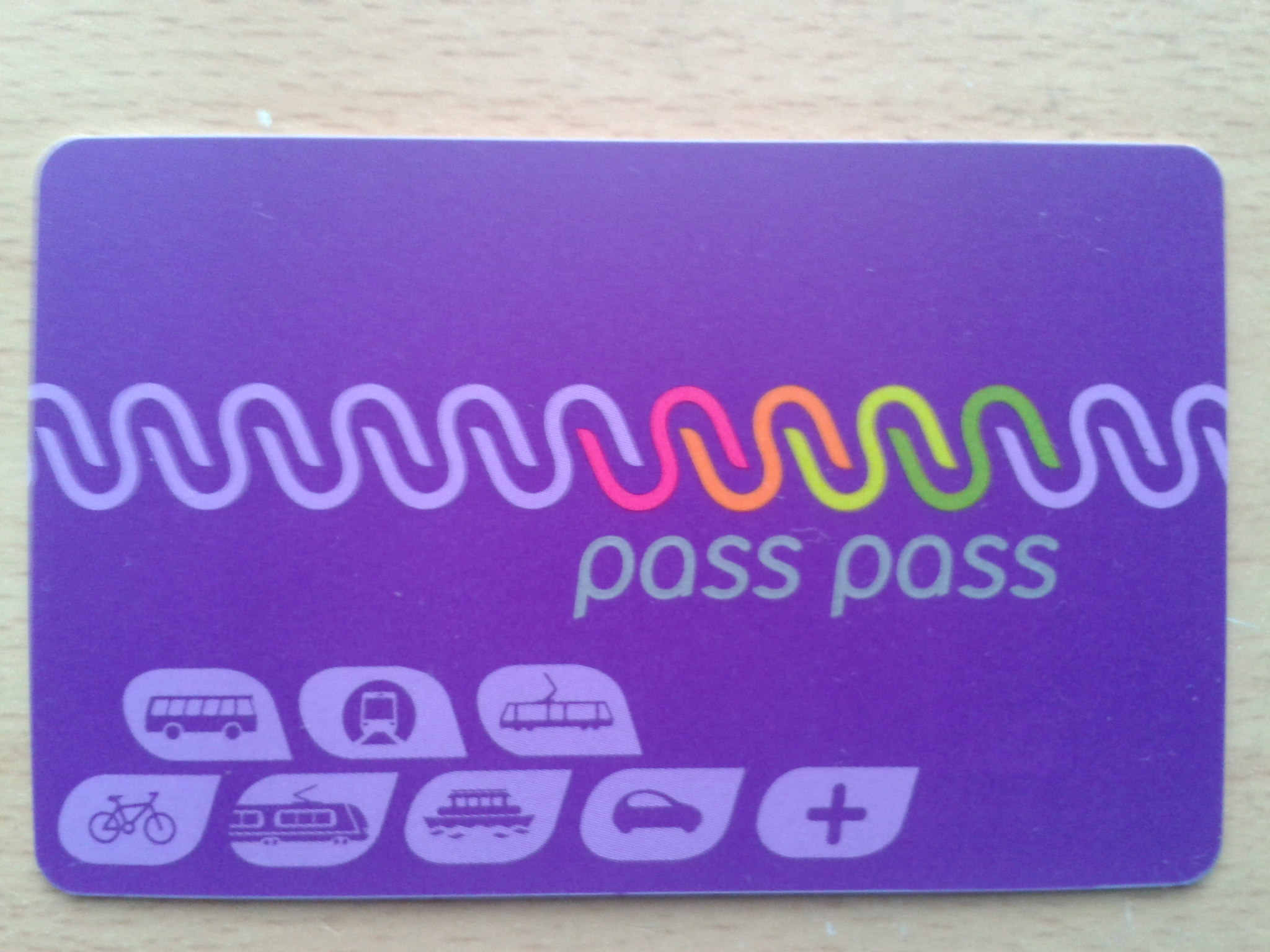 Recto d'une carte Pass Pass, mise en service le 25 juin 2013 sur le réseau de transports de Lille